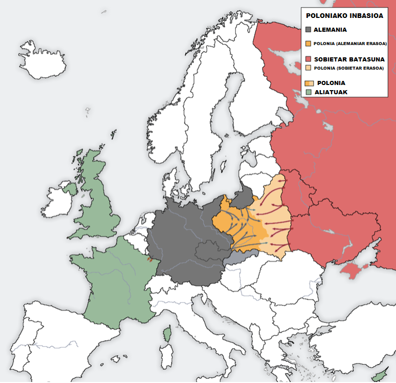 Sobietar Batasunaren inbasioa Polonian